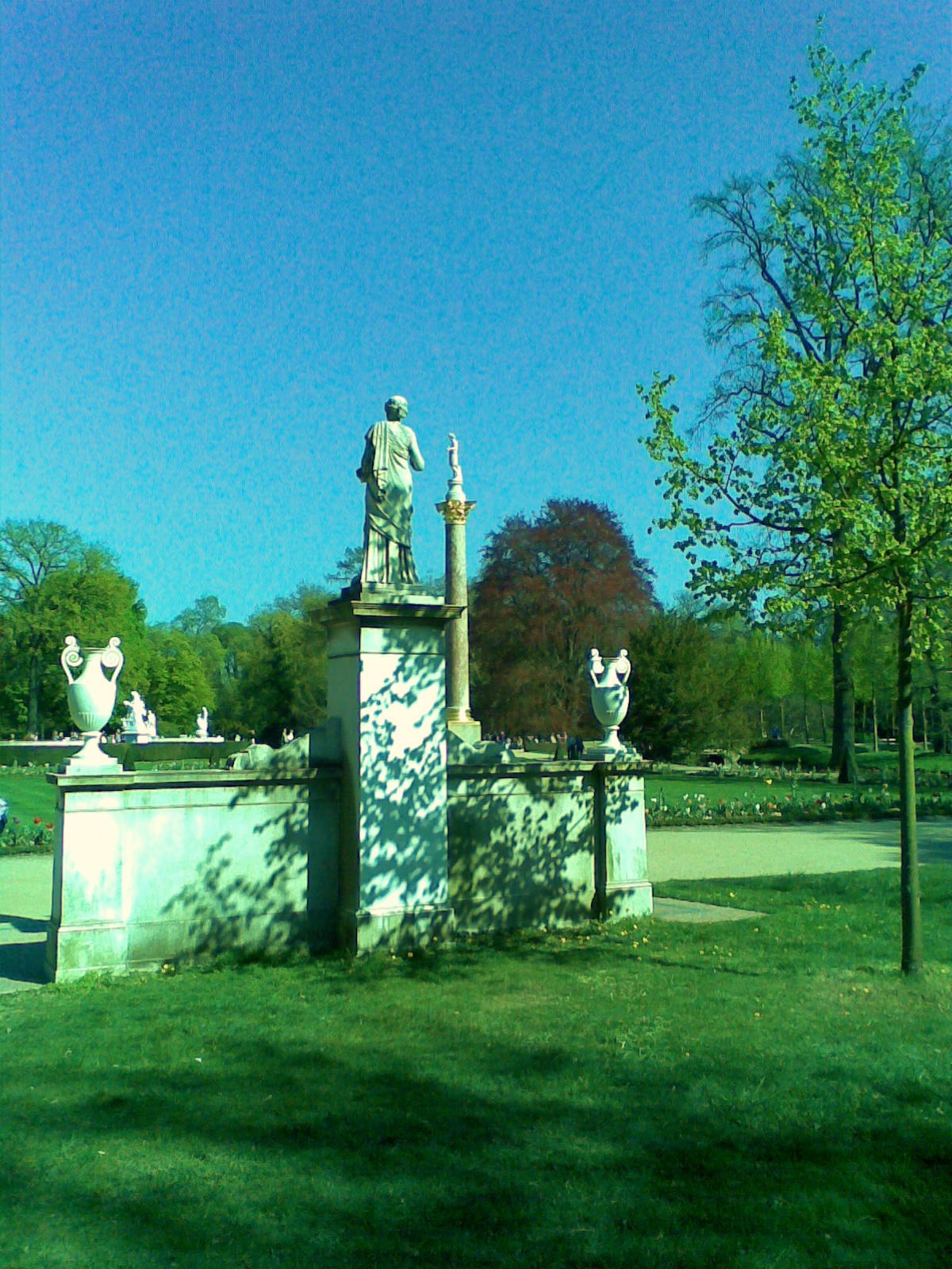 Blaustich in einer Fotografie. An einem sonnenklaren Tag mit knallblauem Himmel war der automatische Weißabgleich des Fotohandys komplett überlastet.